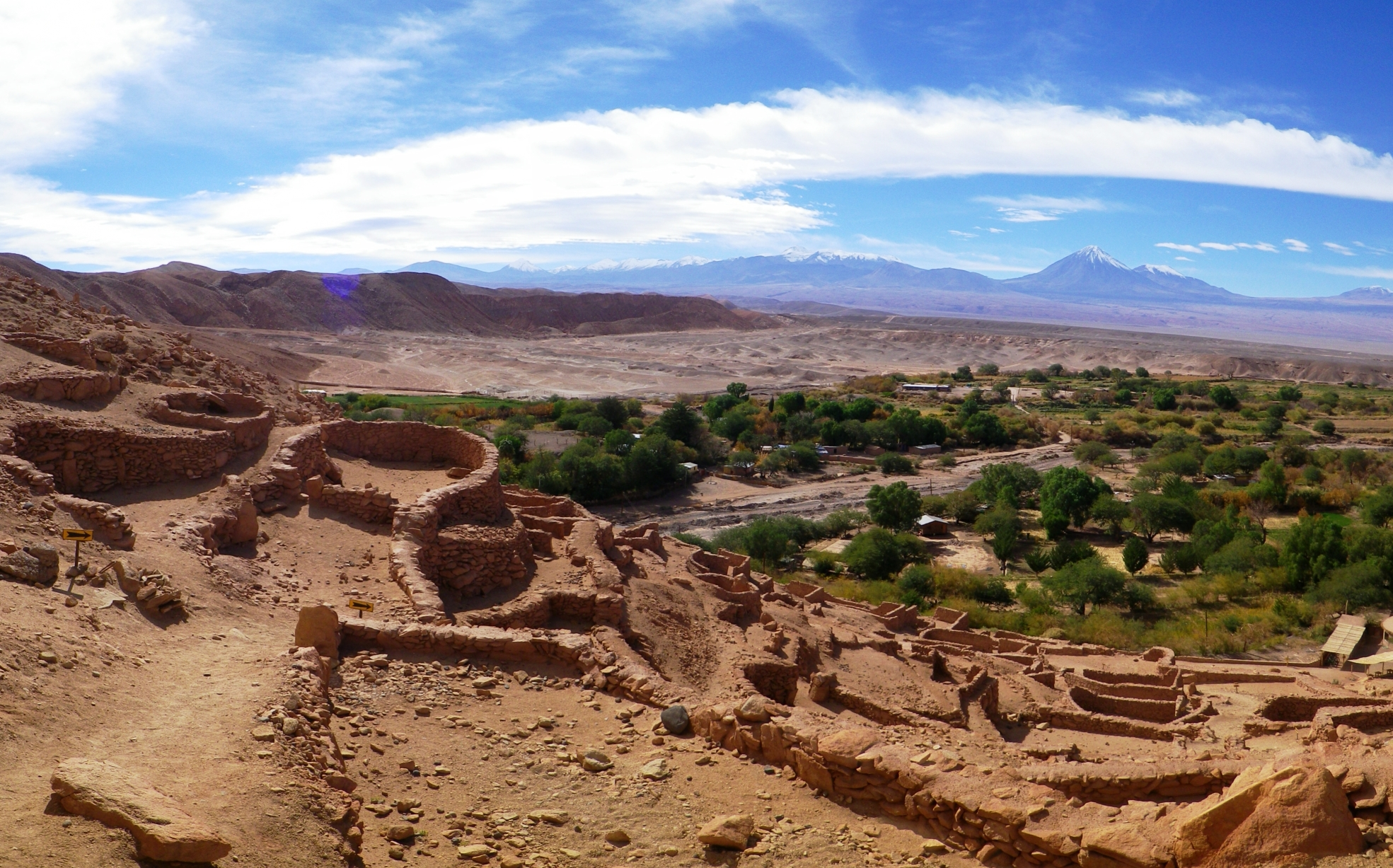 Pucará de Quitor This is a photo of a national monument in Chile: 306